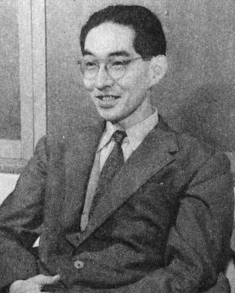 南博